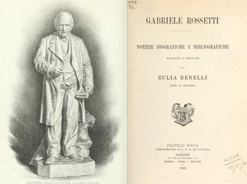 Frontespizio illustrato della Biografia di Gabriele Rossetti di Zulia Benelli del 1898